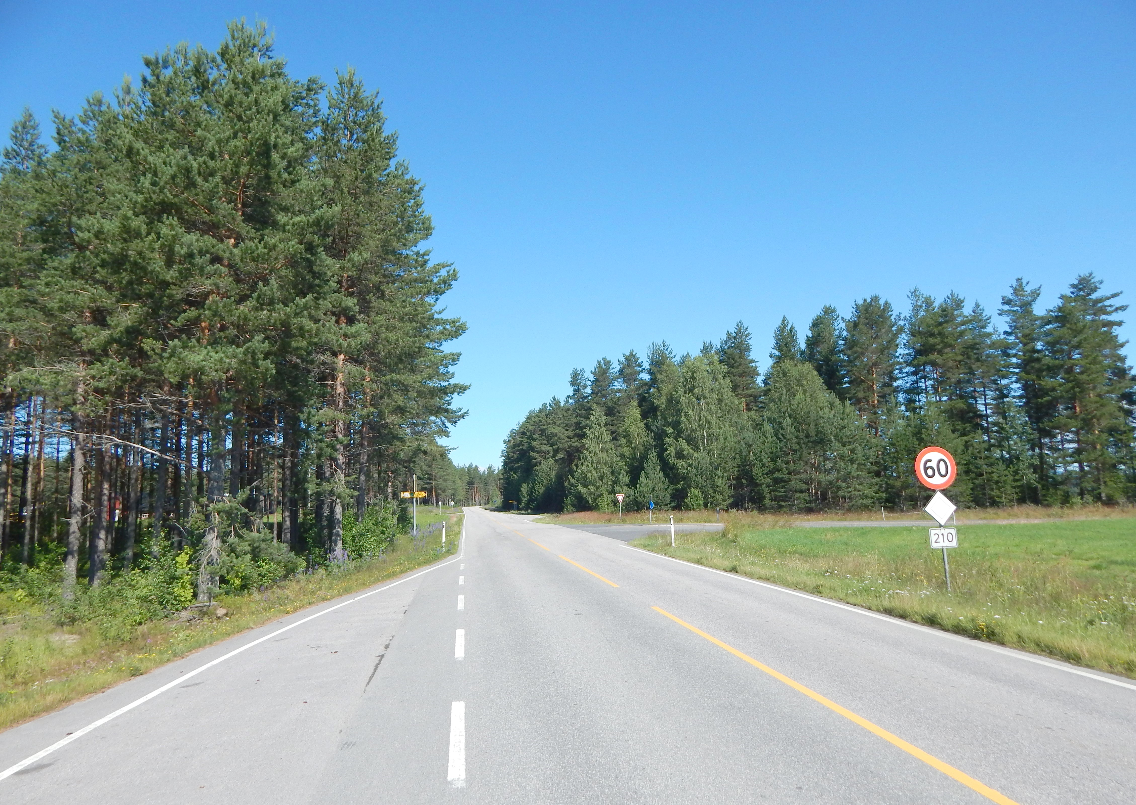 Vestsidevegen (primær fylkesvei 210)